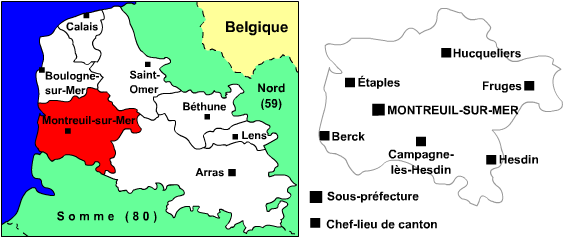 Carte de l'arrondissement de Montreuil-sur-Mer (62) avec chefs-lieux de cantons Utilisateur:Manchot sanguinaire